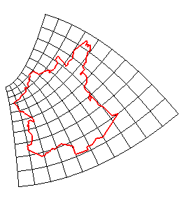 france par t anticonforme r fereol